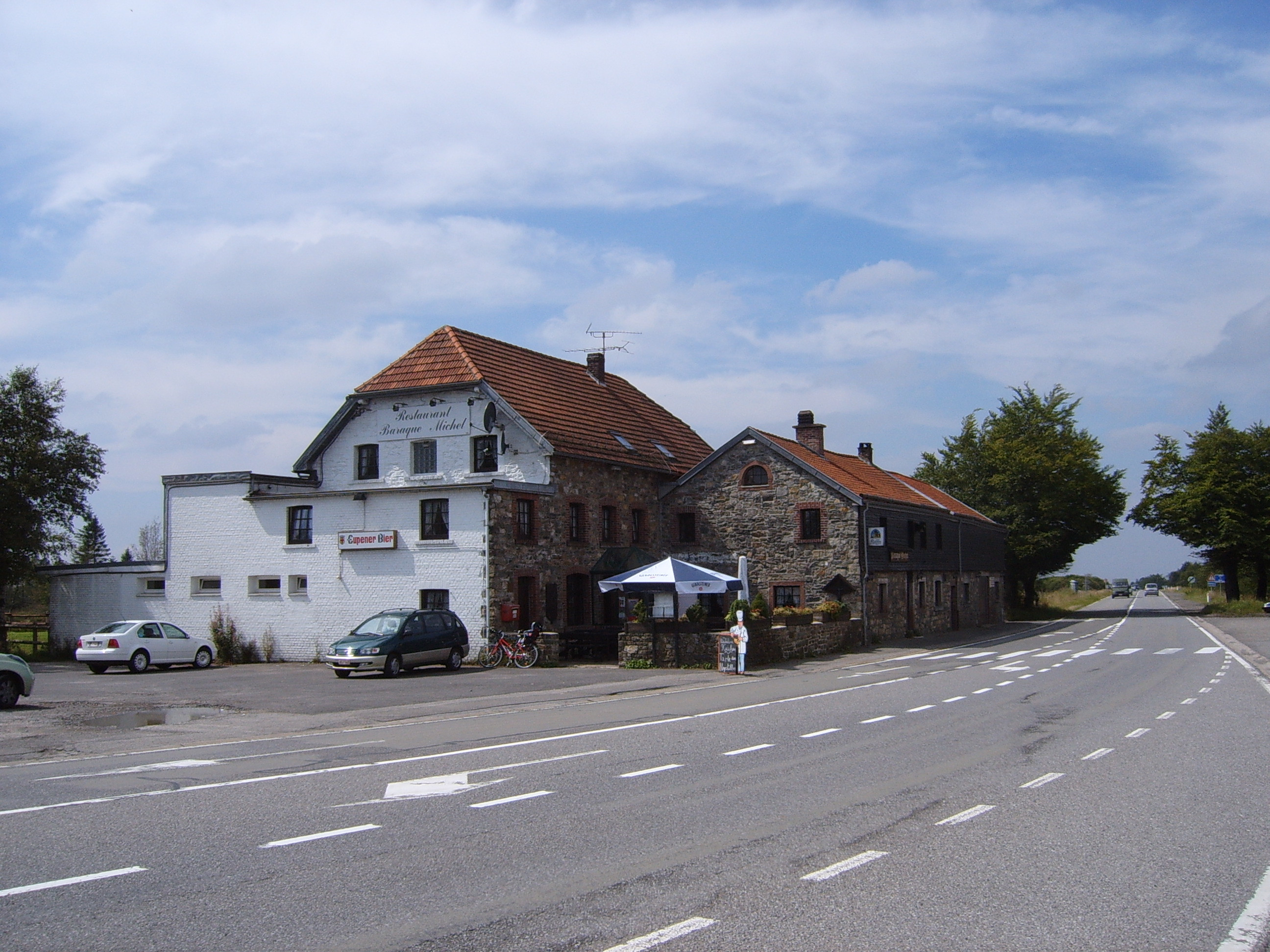 Baraque Michel, Hautes Fagnes, Belgique.